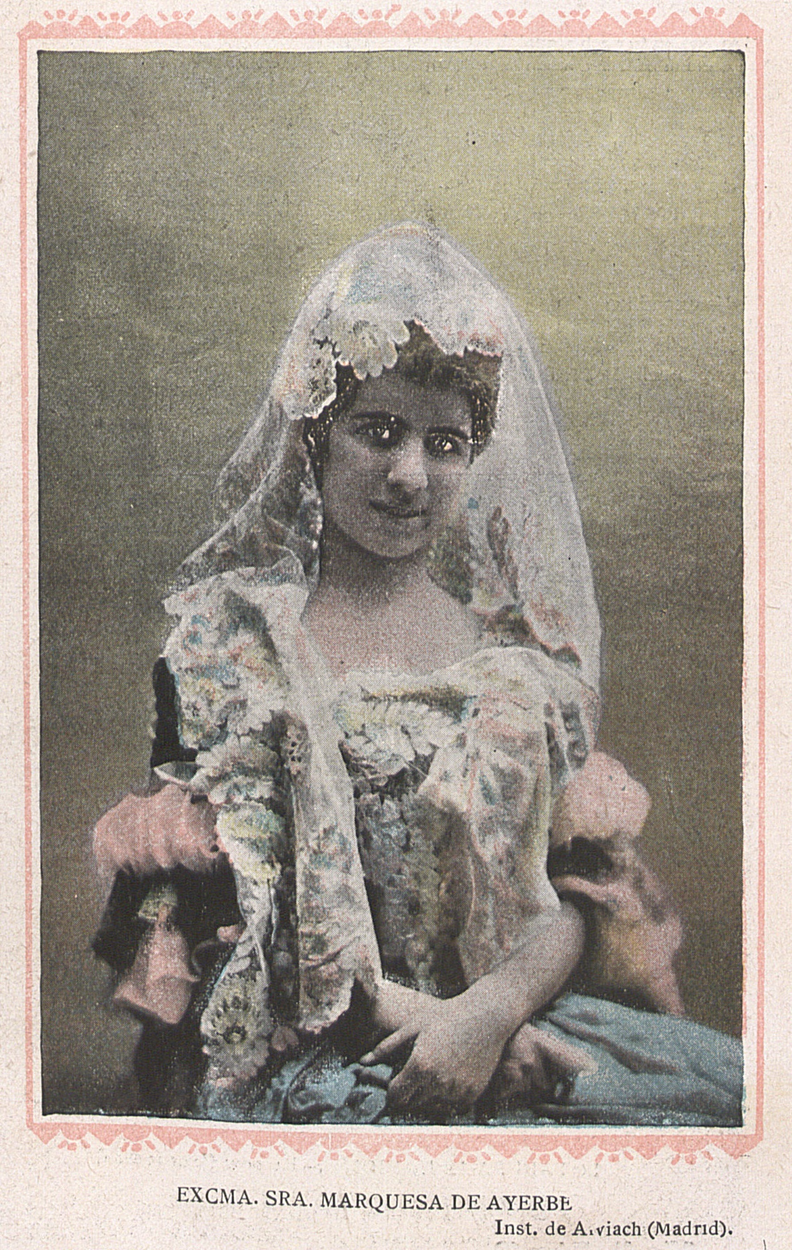 Excma. Sra. Marquesa de Ayerbe. Inst. de Alviach (Madrid)